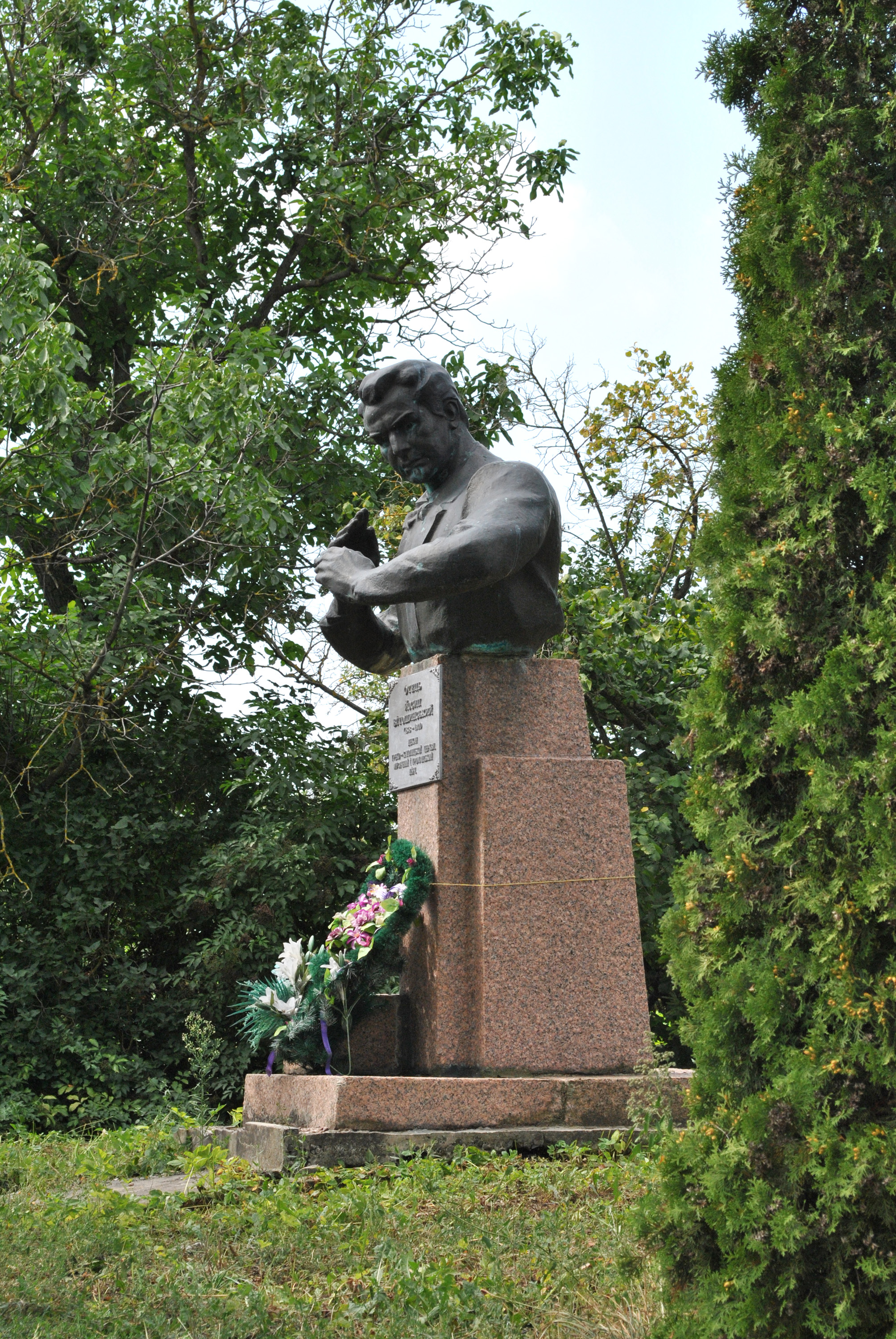 Пам'ятник громадському діячу, диригенту, священику Вітошинському Осипу Сильвестровичу в селі Денисів Козівського району Тернопільської області.